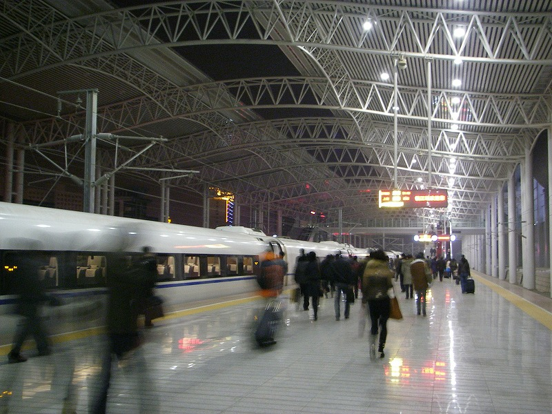 Zhenjiang Railway Station 2010/12